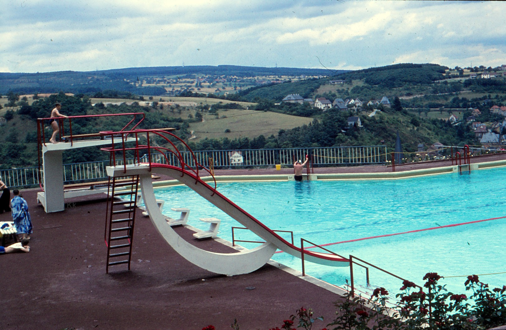 Am 14. Juli 1962 eröffnete das neu erbaute Höhenfreibad in Stromberg/Hunsrück. Die Aufnahme entstand im August 1962.